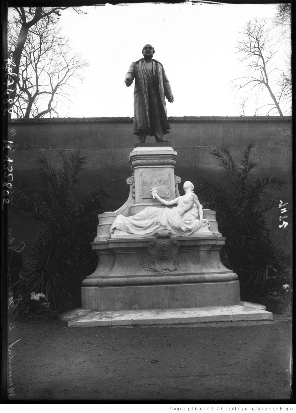 Monument du docteur Péan inauguré le 14 décembre 09 [statue du chirurgien située Boulevard de Port-Royal, Paris, 13e arrondissement] : [photographie de presse] / [Agence Rol]